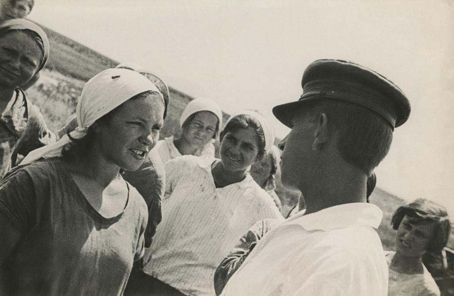 1930. Колхоз «Хлебороб»